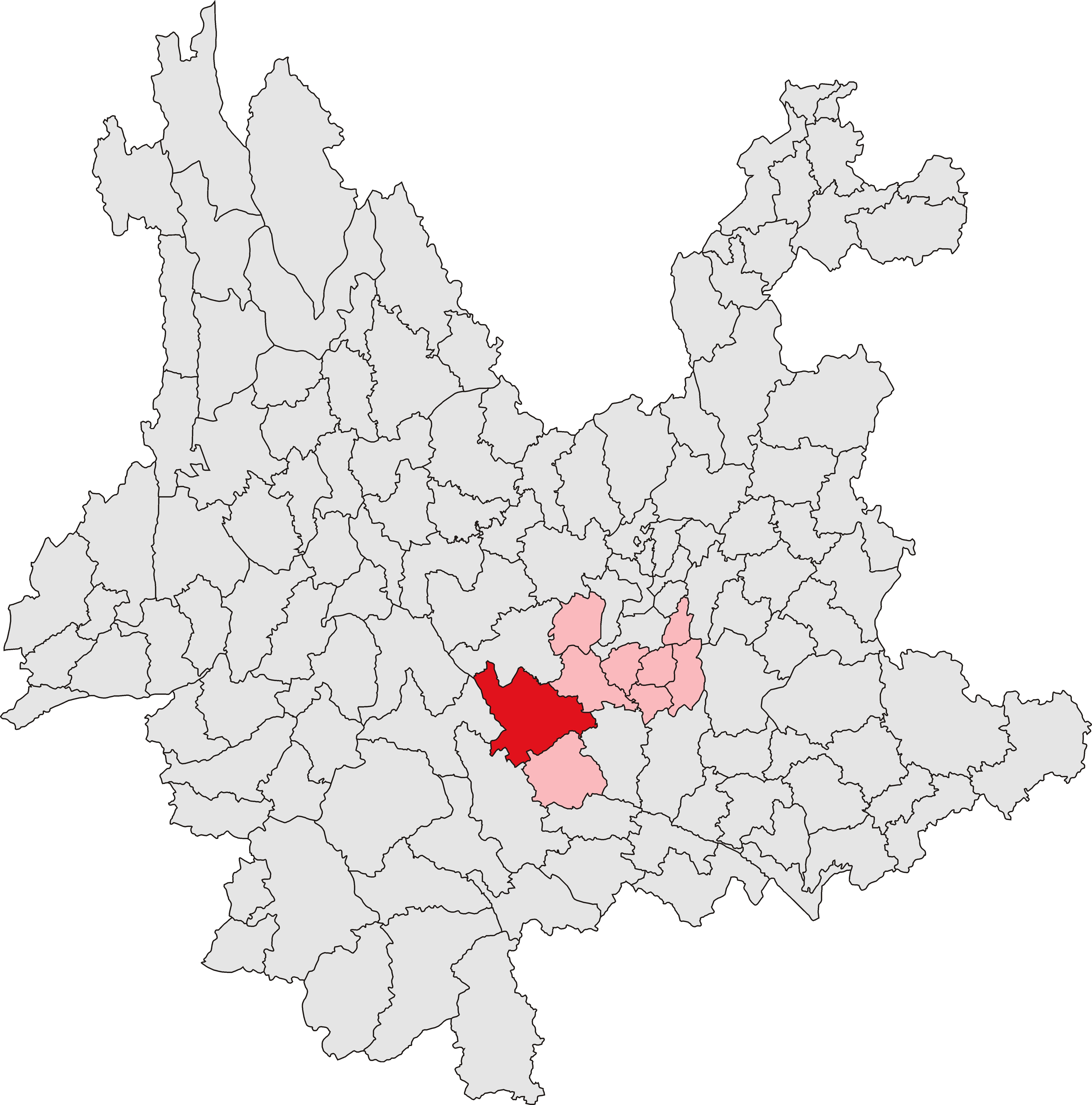 中文（中国大陆）: 新平彝族傣族自治县位置图